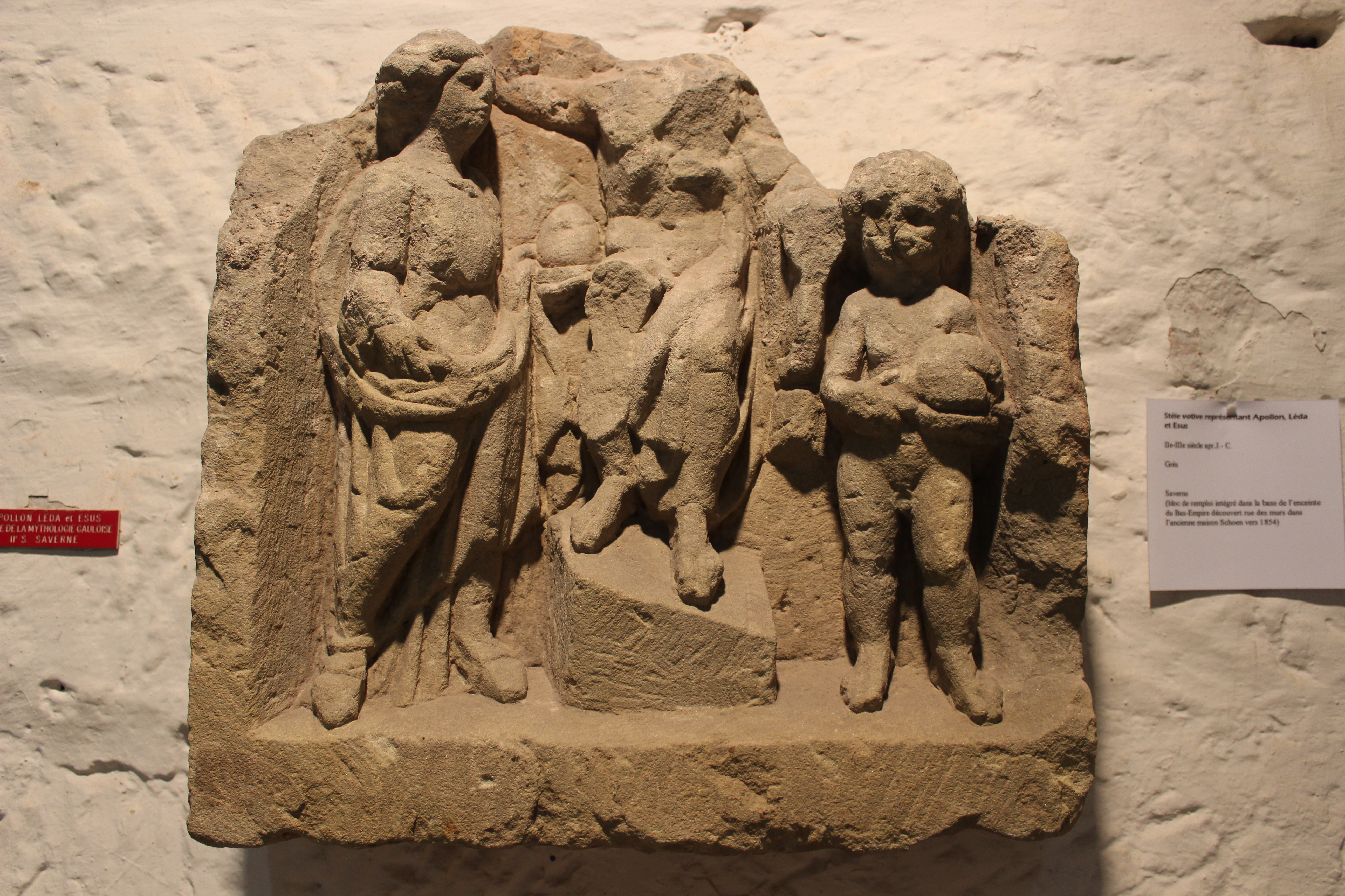 Triade divine provenant de Saverne